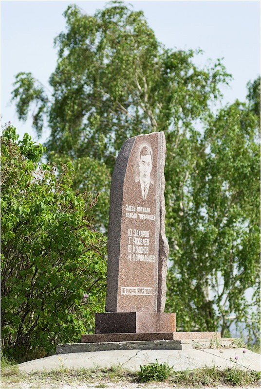 Памятник Юрию Захарову с товарищами, Молодецкий курган, Самарская область, Россия